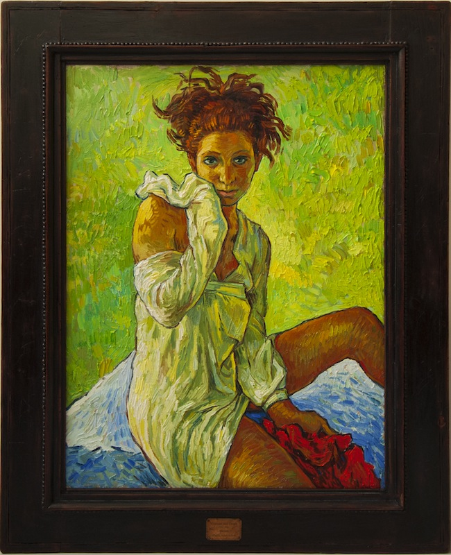 Peinture réalisée par l'artiste Achot Achot dans le cadre de son projet “Van Gogh, « Afactum » (d'après Achot Achot)”.